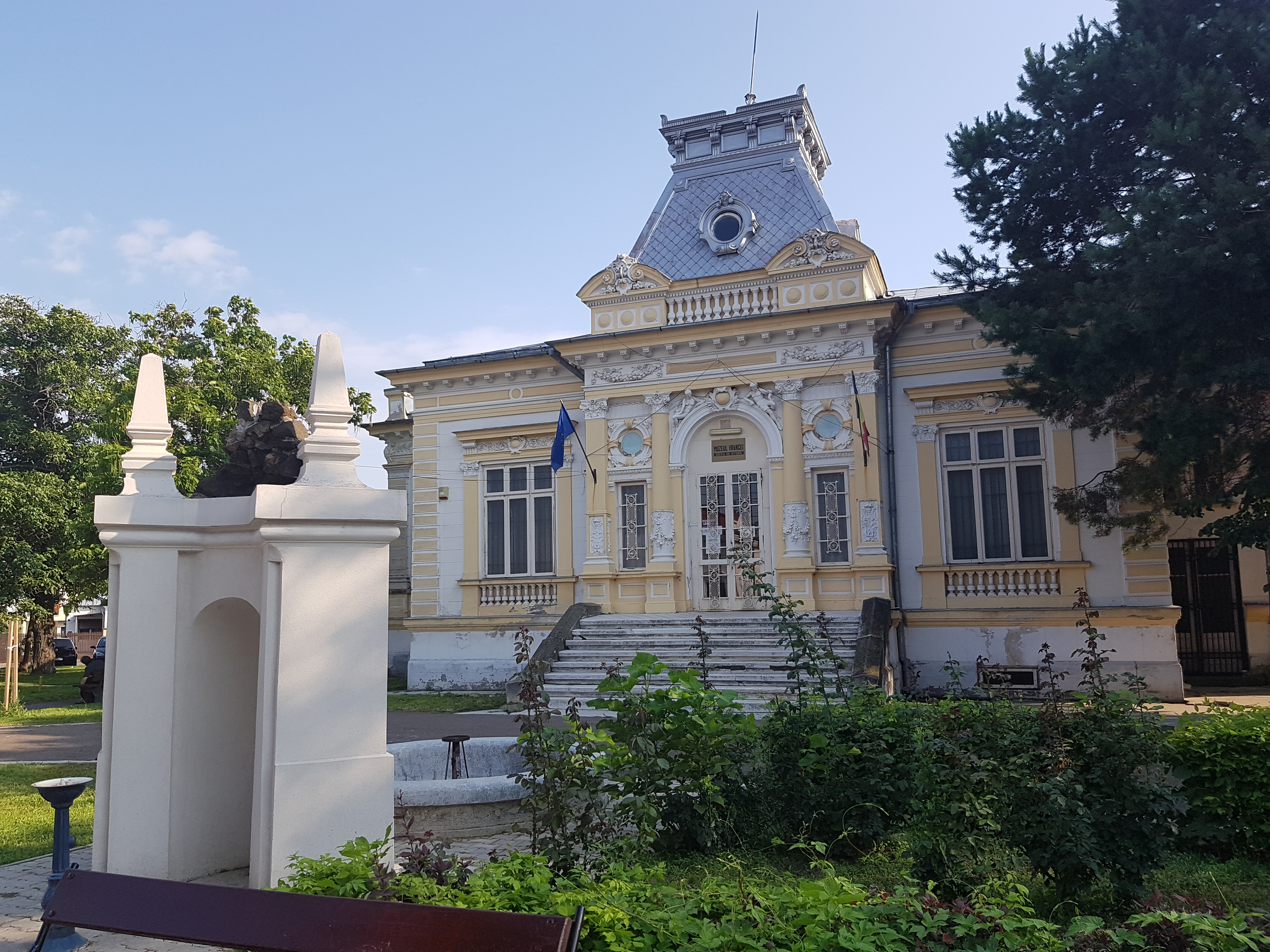 Casa Alaci (fost pension)